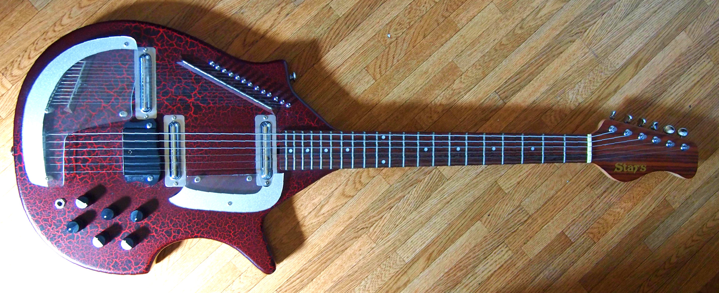 ブログ【ギター】スターズ エレキシタール レッド（Star’s Electric Sitar RD）持ってるんだよ